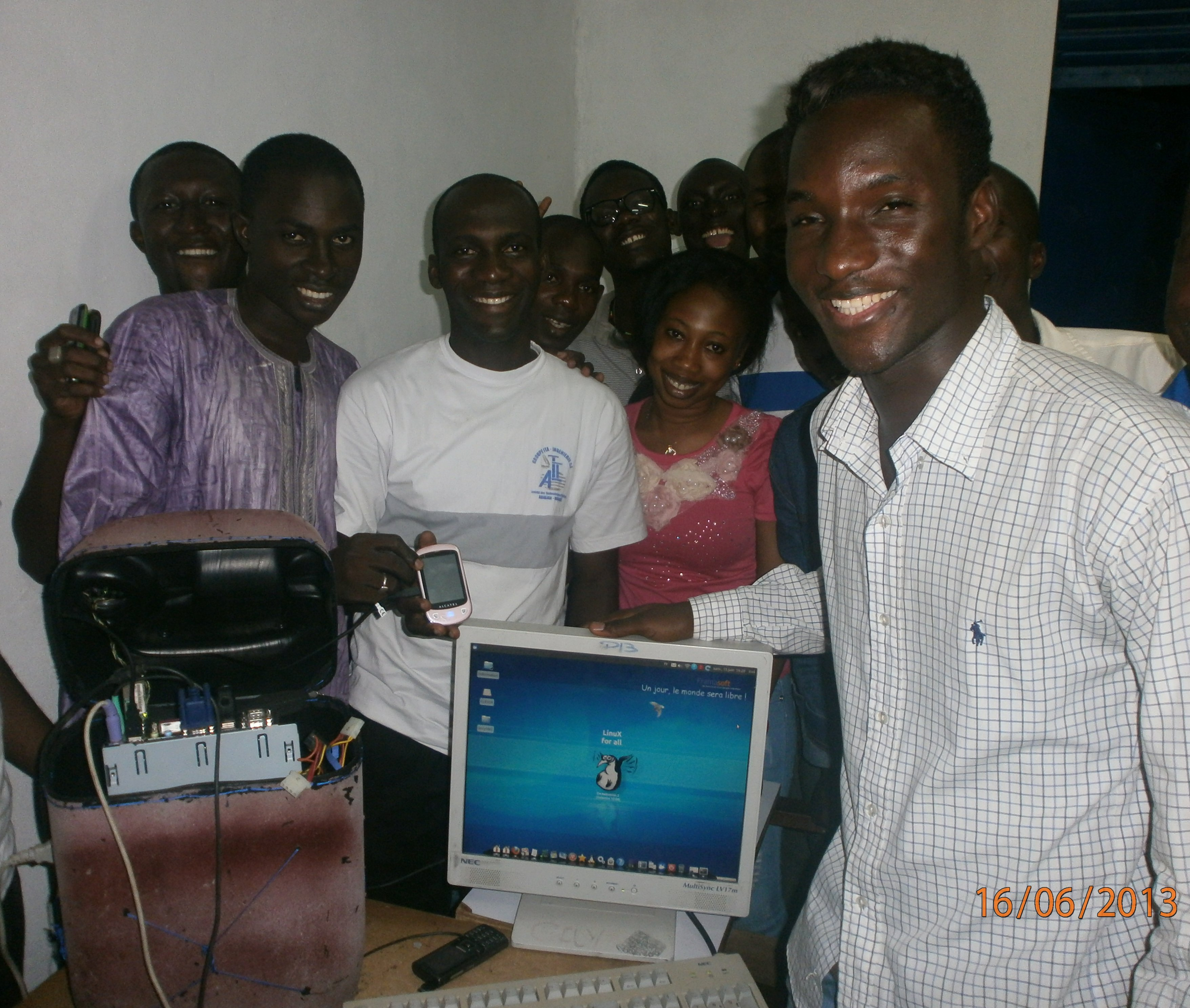 Une équipe met en place un système de suivi des malades de la tuberculose par SMS avec un Jerry tournant sous Emmabuntüs du Collectif Emmabuntüs et un téléphone portable. projet Jerrytub